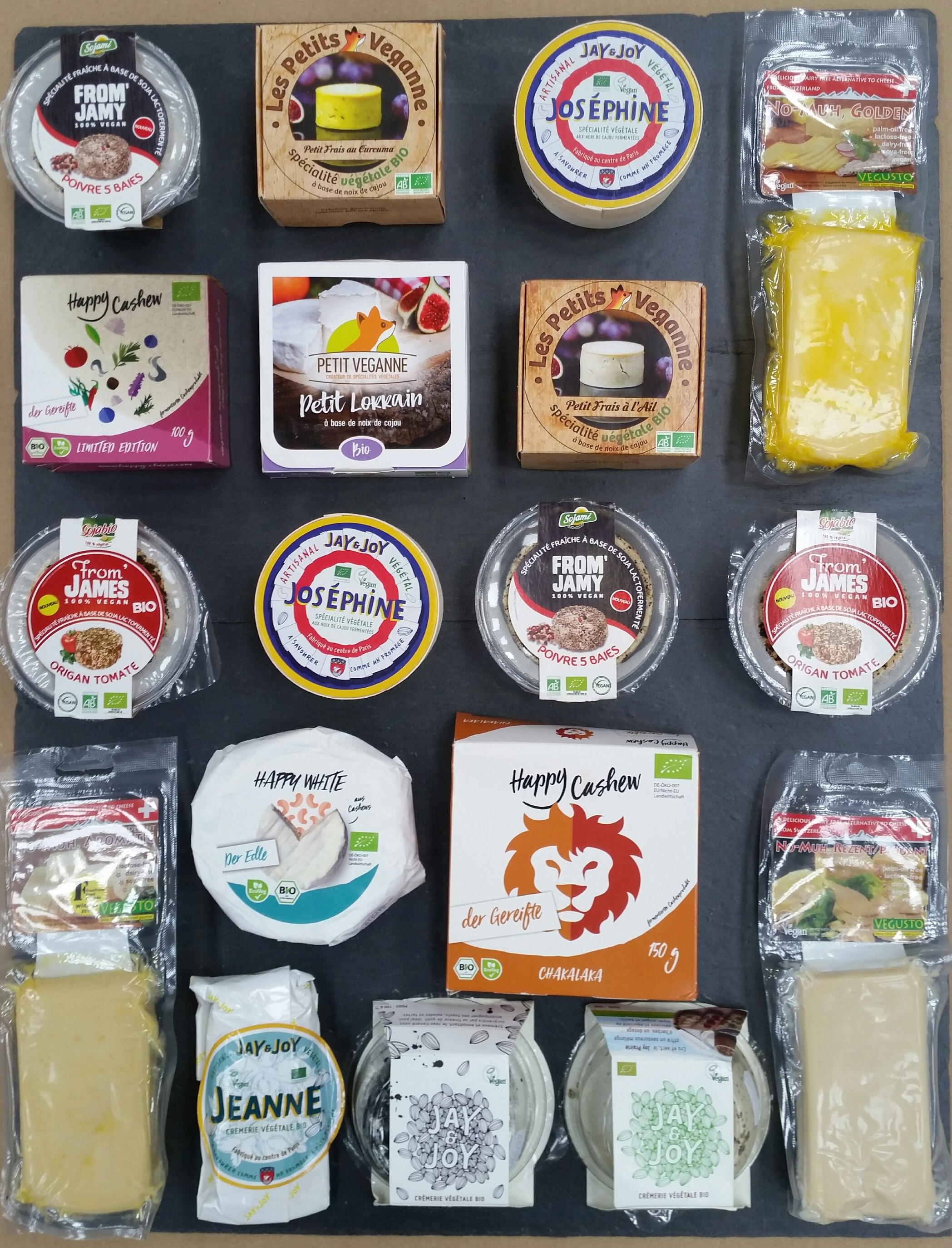 Assortiment de fromages végétaux végans disposés sur une ardoise